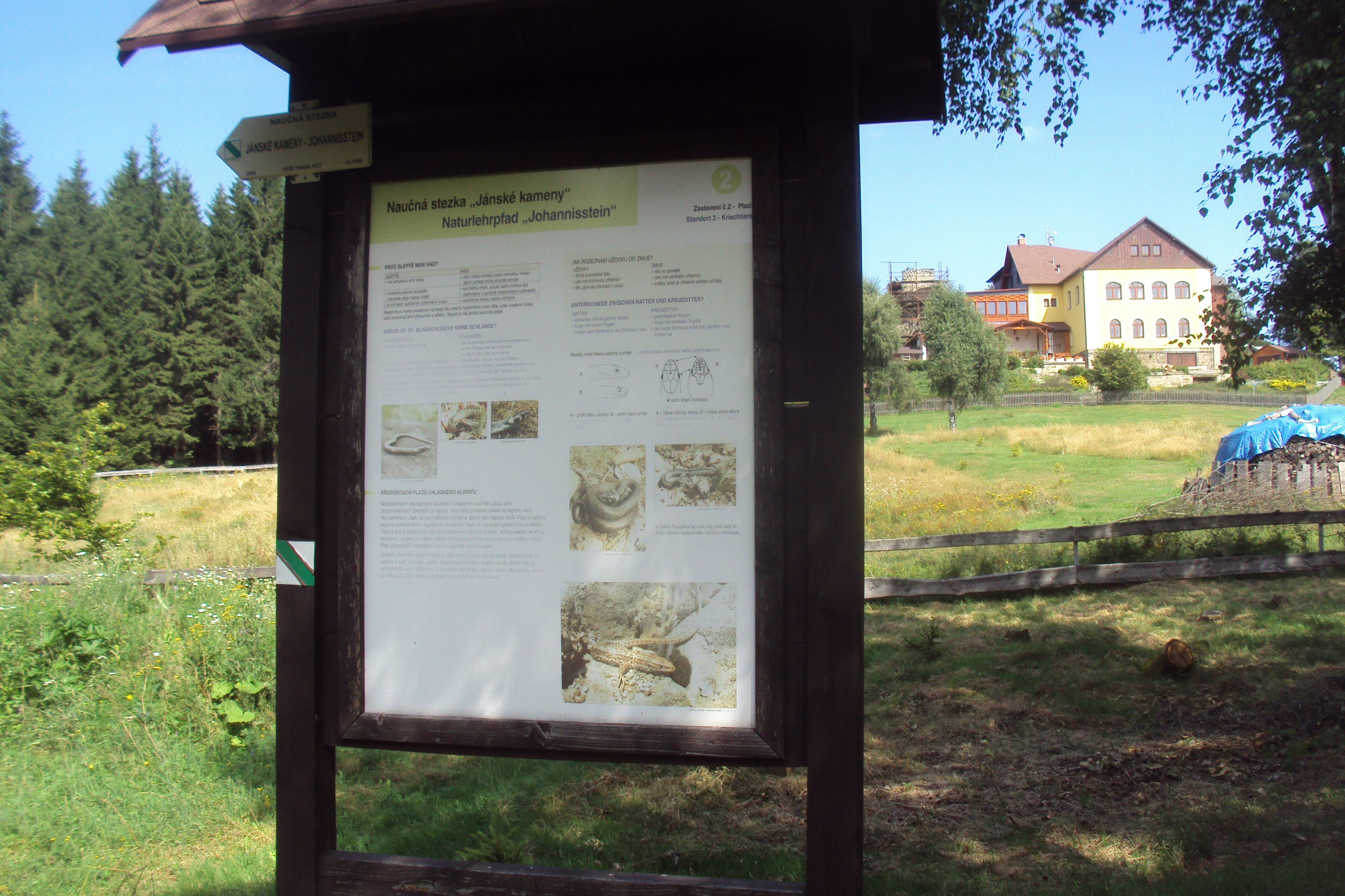 Druhý panel naučné stezky